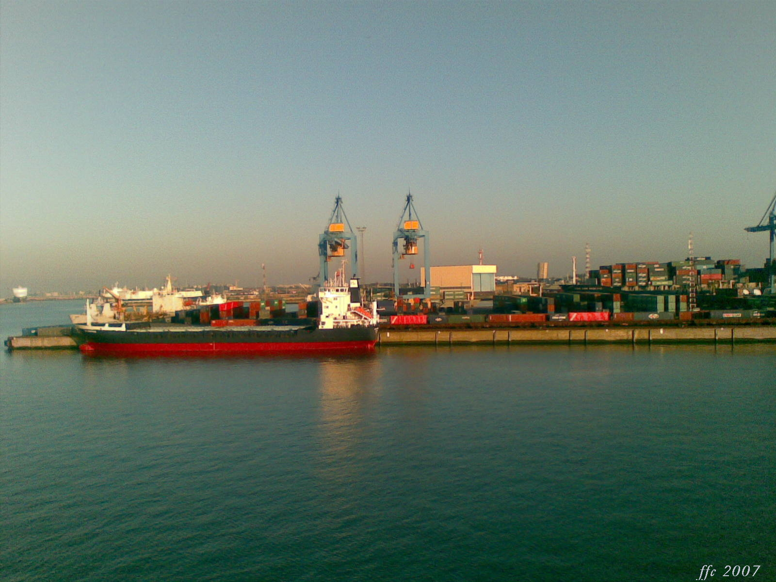 Termina trimodal a Zeebrugge